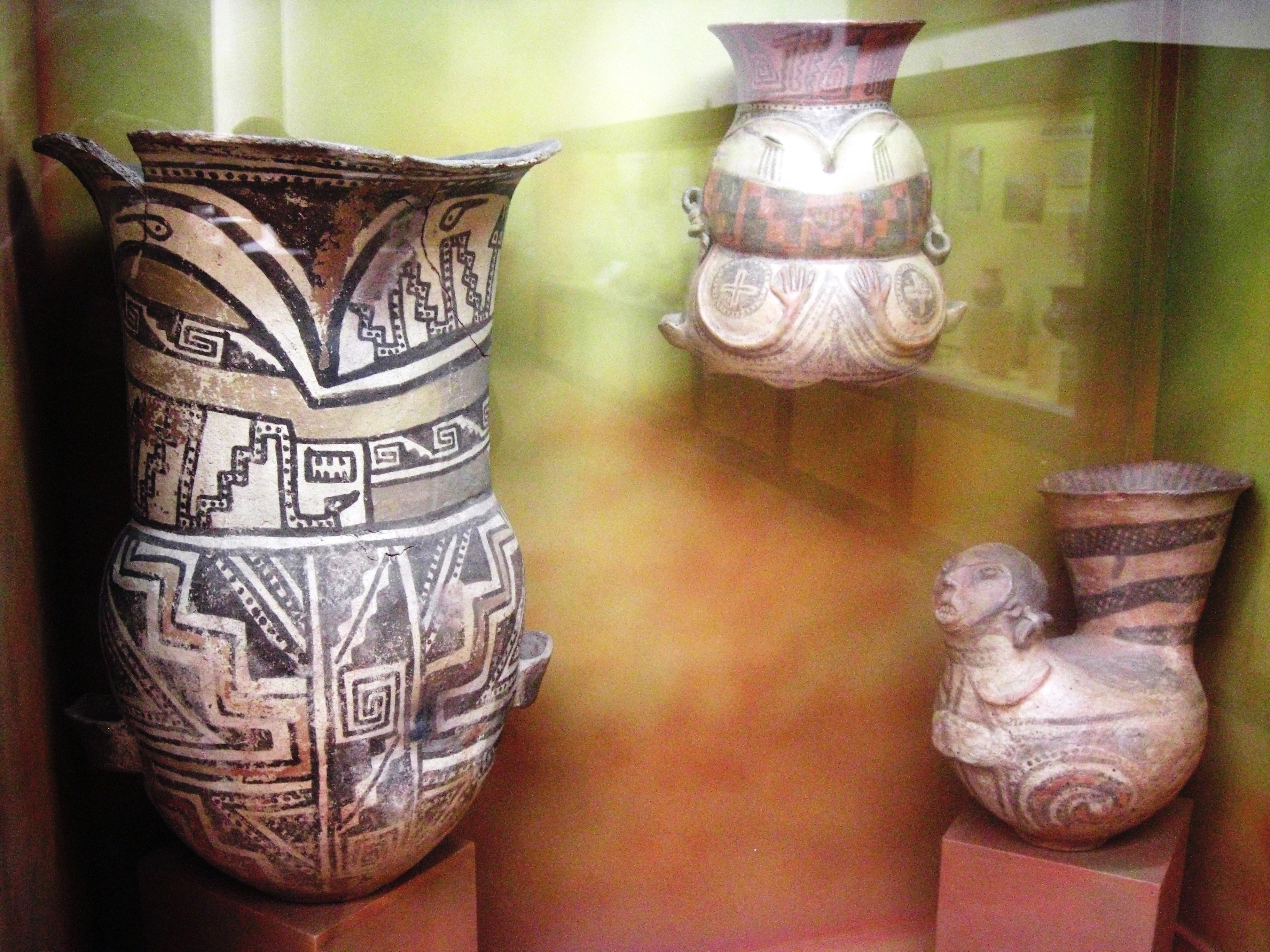 Detalle de la vitrina dedicada a la cultura del valles calchaquíes .Museo de la Plata. Argentina